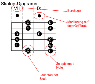 Legende der Skalentabulatur